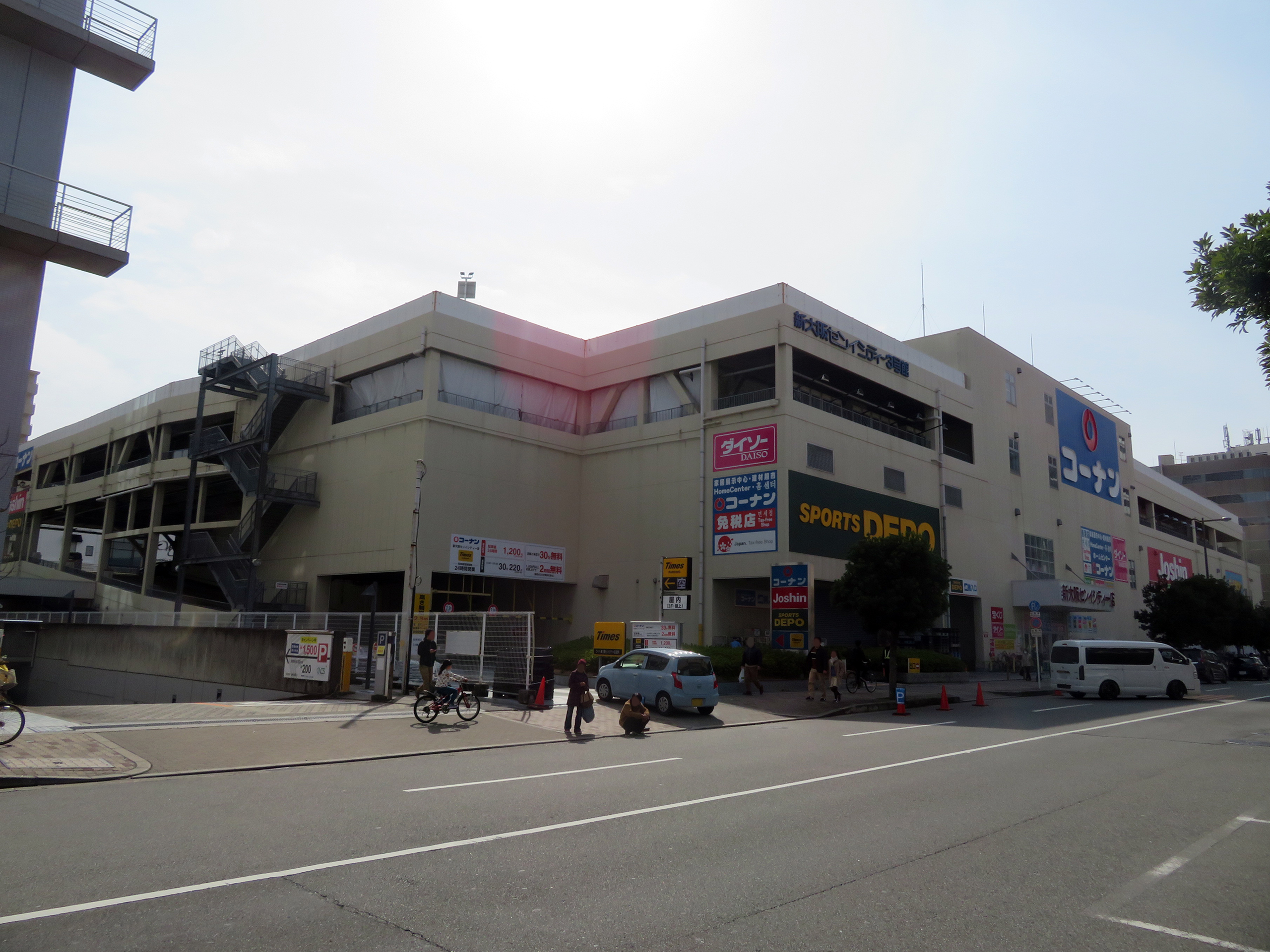 新大阪センイシティー（ゆめっせ）3号館を撮影。